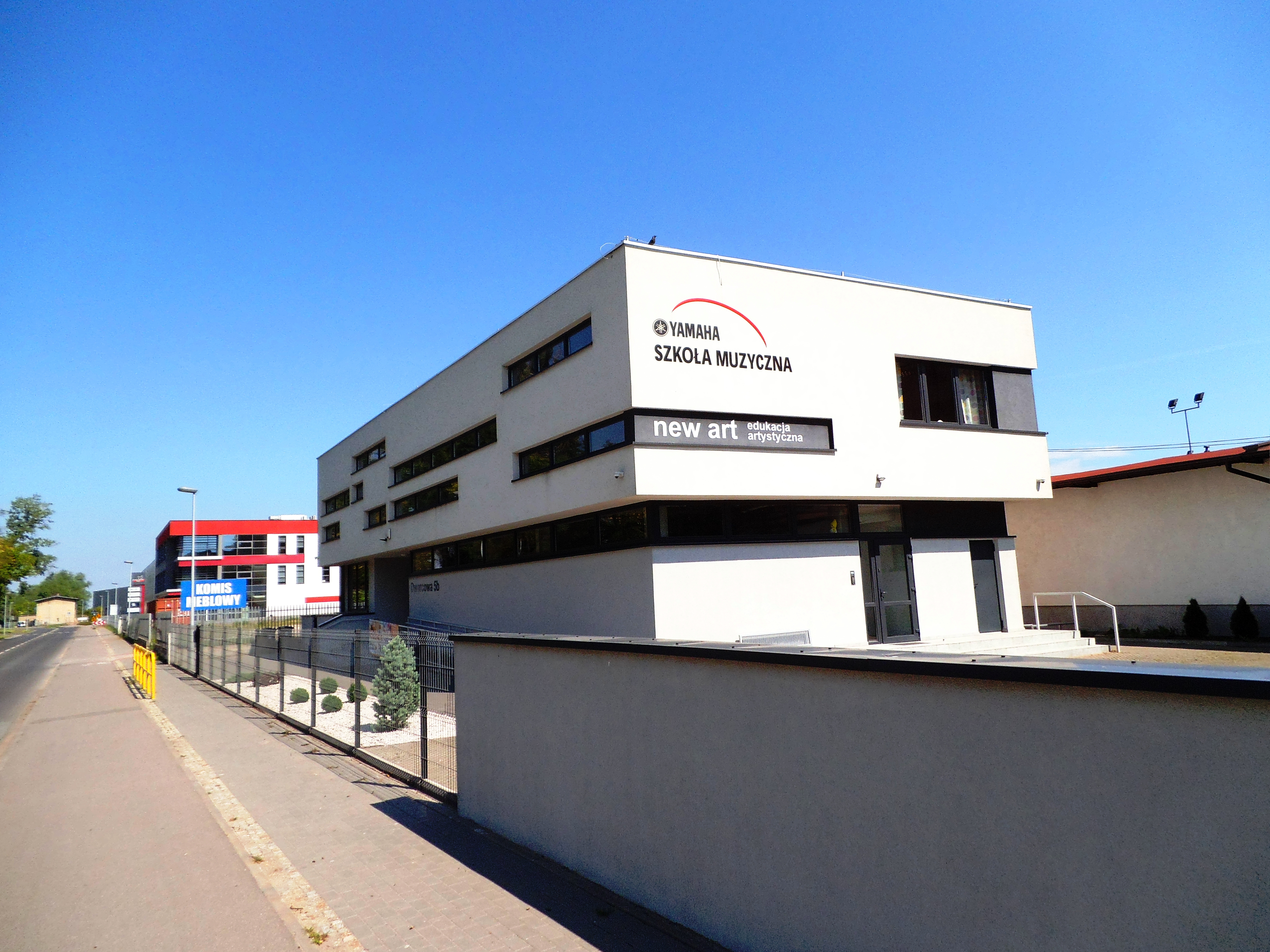 Ulica Dworcowa w Toruniu